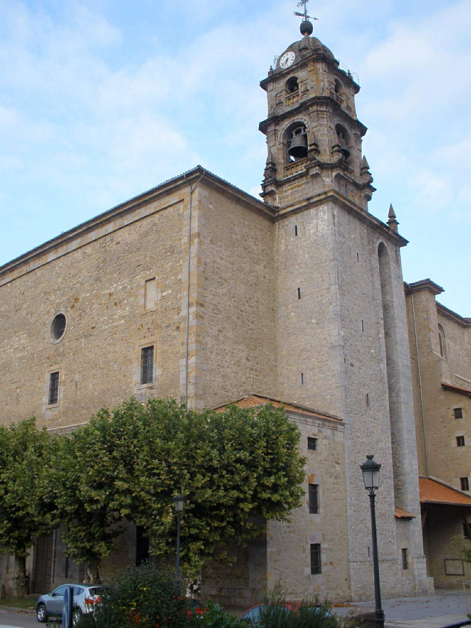 Iglesia de Santa Marina de Oxirondo, Bergara (Gipuzkoa)